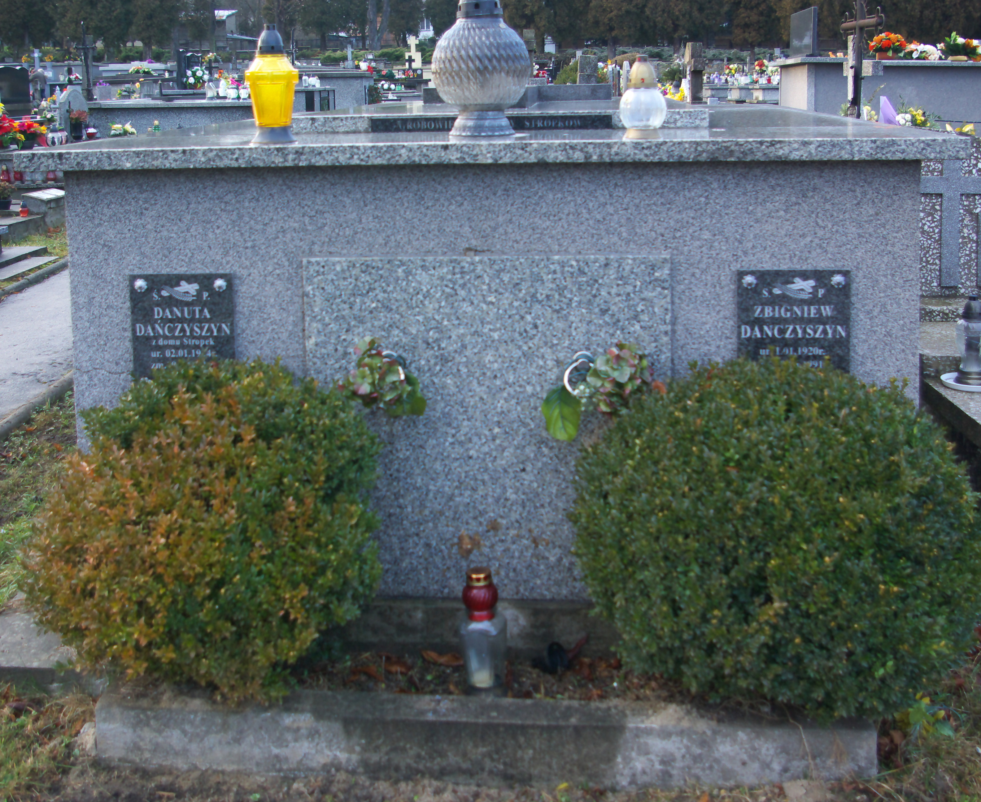 Grobowiec rodziny Stropek na Cmentarzu Centralnym w Sanoku. Pochowany Zbigniew Dańczyszyn.